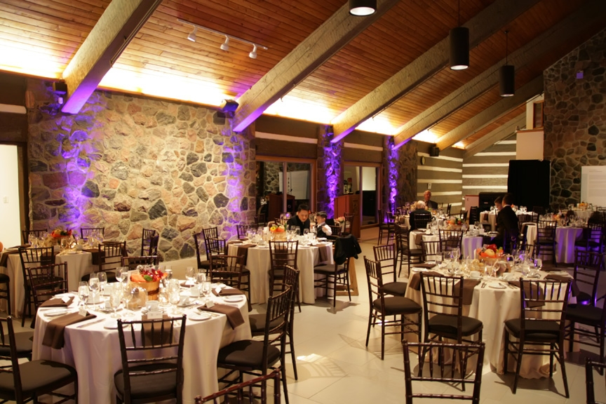 Grand Hall